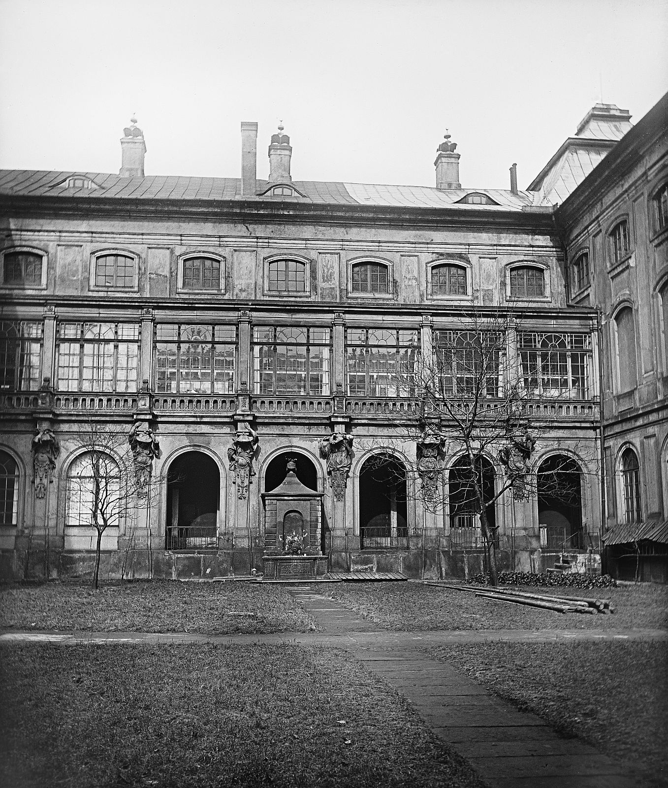 Japanisches Palais, Innenhof, Nordwestlicher Seitenflügel, um 1889